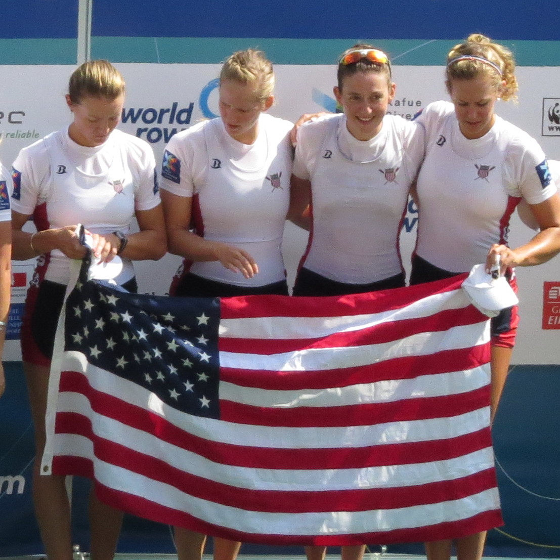 Podium du W4- GBR : CHIN, Rebecca BENNETT, Karen GOODERHAM, Lucinda NORTON, Holly USA : O'BRIEN, Kristine LATZ, Grace MARTELLI, Adrienne et LUCZAK, Grace CHN : YIN, Dameng, CHENG, Wenjing, YI, Liqin et YU, JING